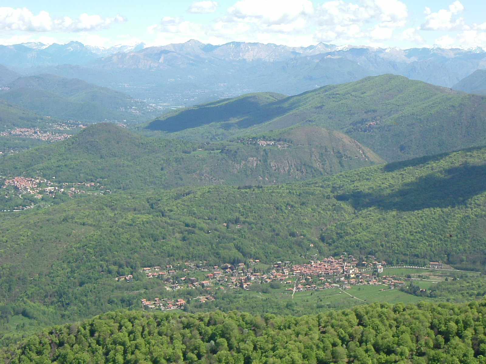 Brinzio visto dalla Punta Paradiso del Campo dei Fiori di Varese